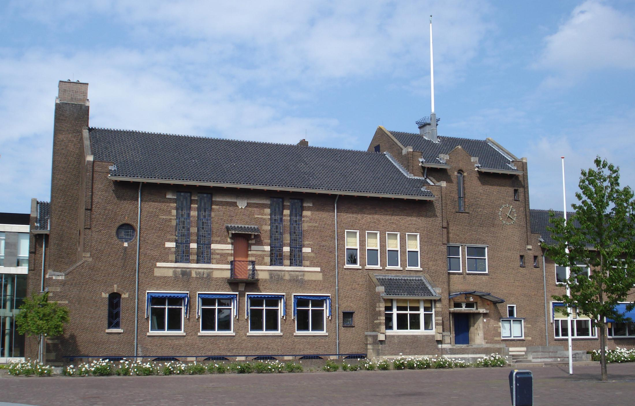 Rijksmonument. Raadhuis. Zwijnsdrecht/The Netherlands.